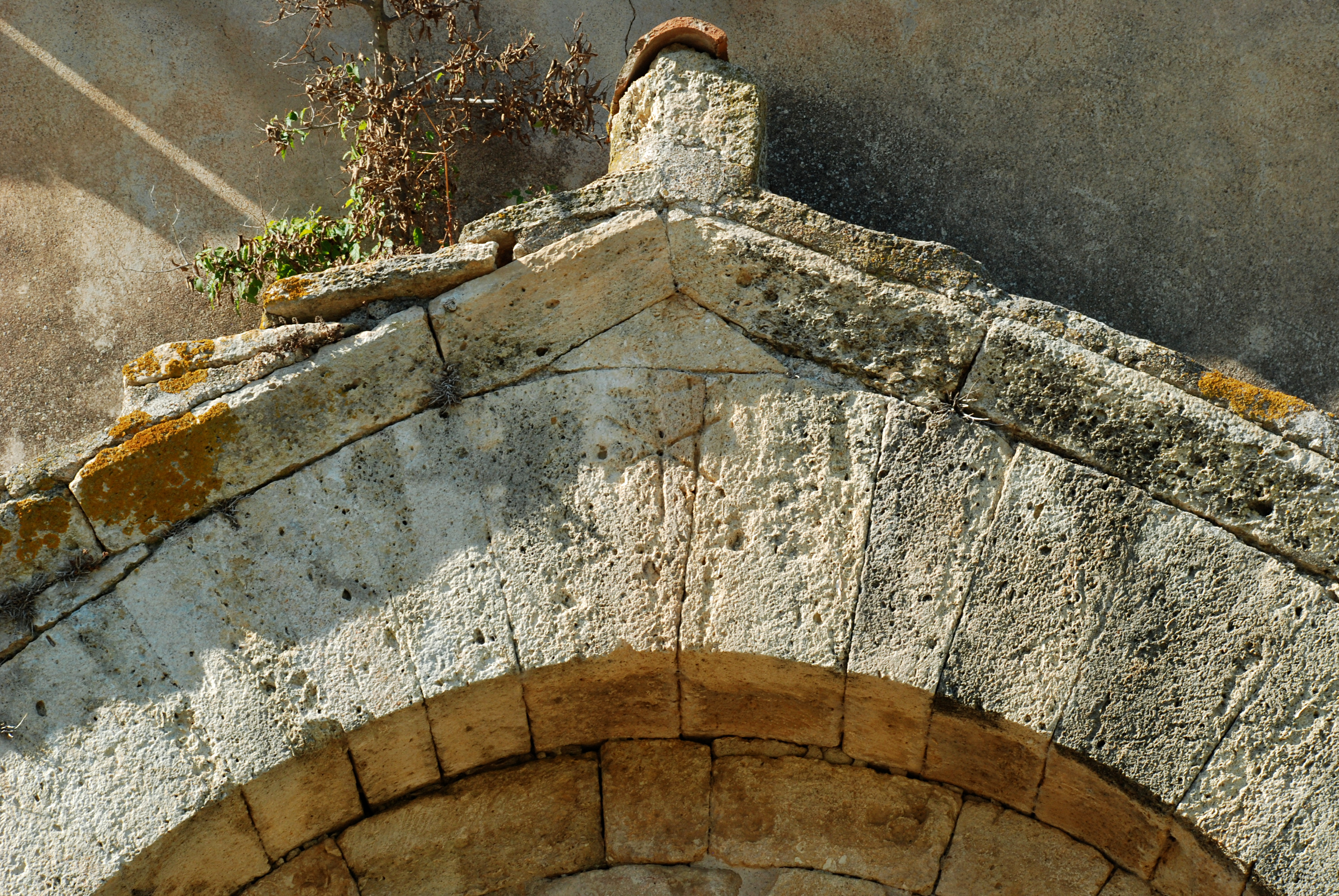 France - Languedoc - Hérault - Roujan - chapelle Saint-Nazaire